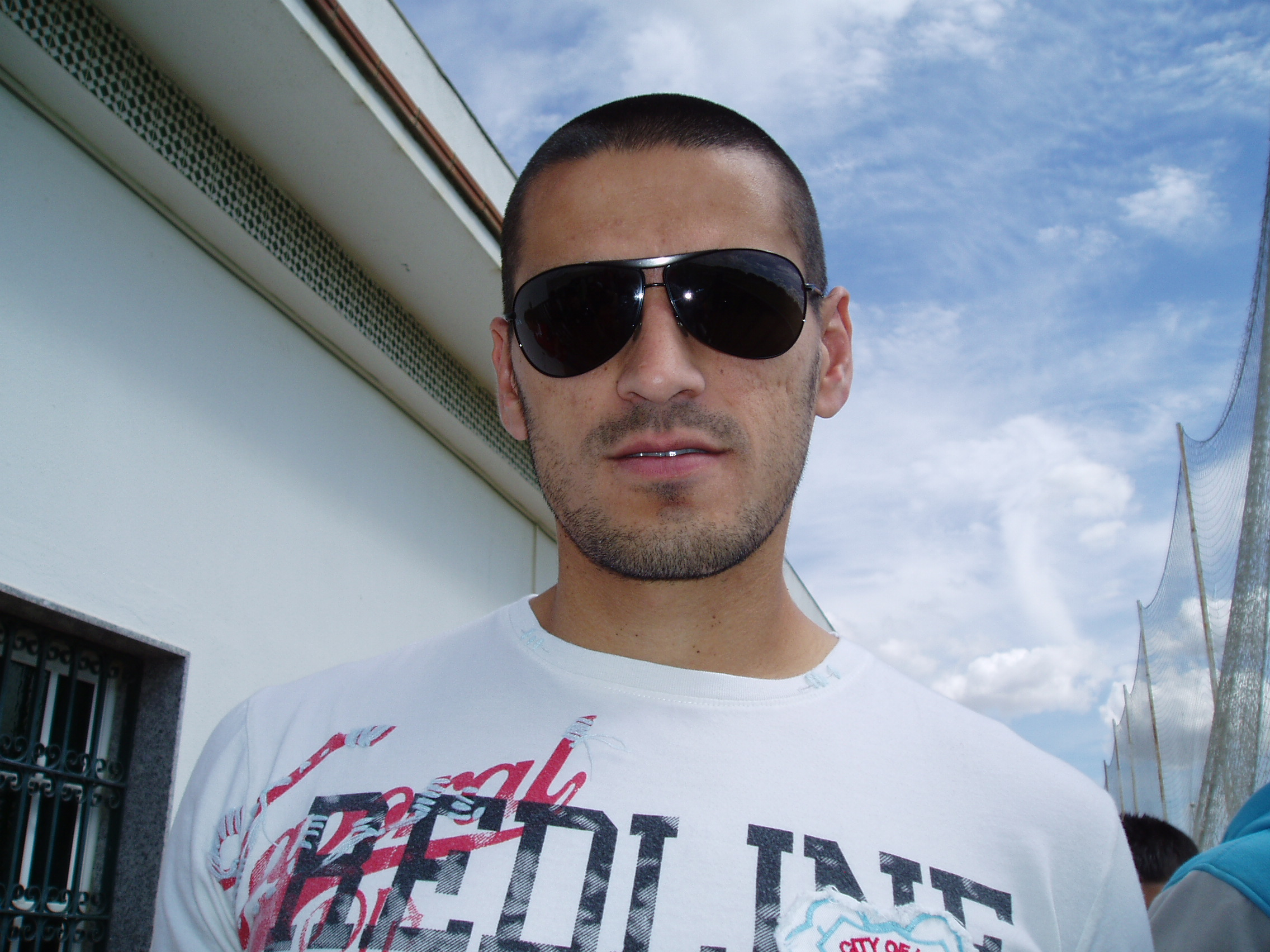 El jugador Juan Gutiérrez Moreno, "Juanito", a la salida de los entrenamientos